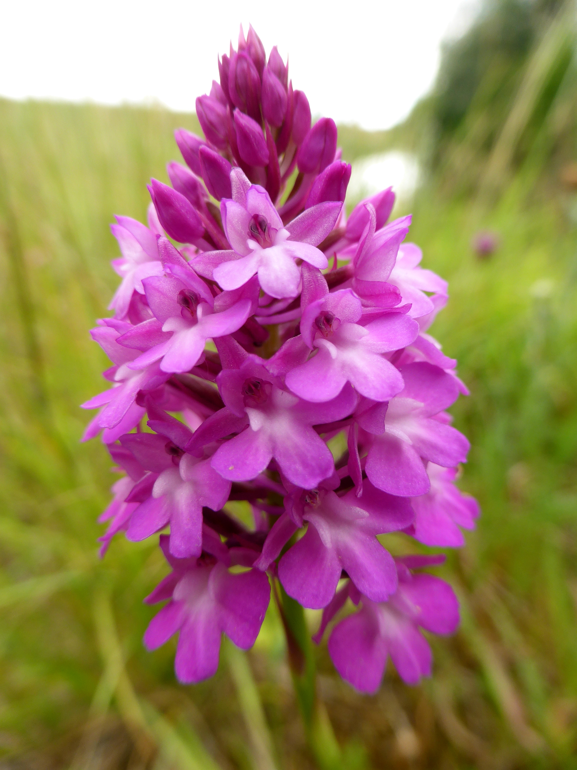 Pyramiden-Hundswurz (Anacamptis pyramidalis), Fort-Louis (France, Alsace), 13.06.2015